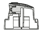 Schnittzeichnungen unterliegen nicht dem Urheberrecht. Jeder darf genauso eine Zeichnung anfertigen. Es ist jedoch möglich, dass der dargestellte Gegenstand einem Patent oder dem Markenrecht unterliegt.